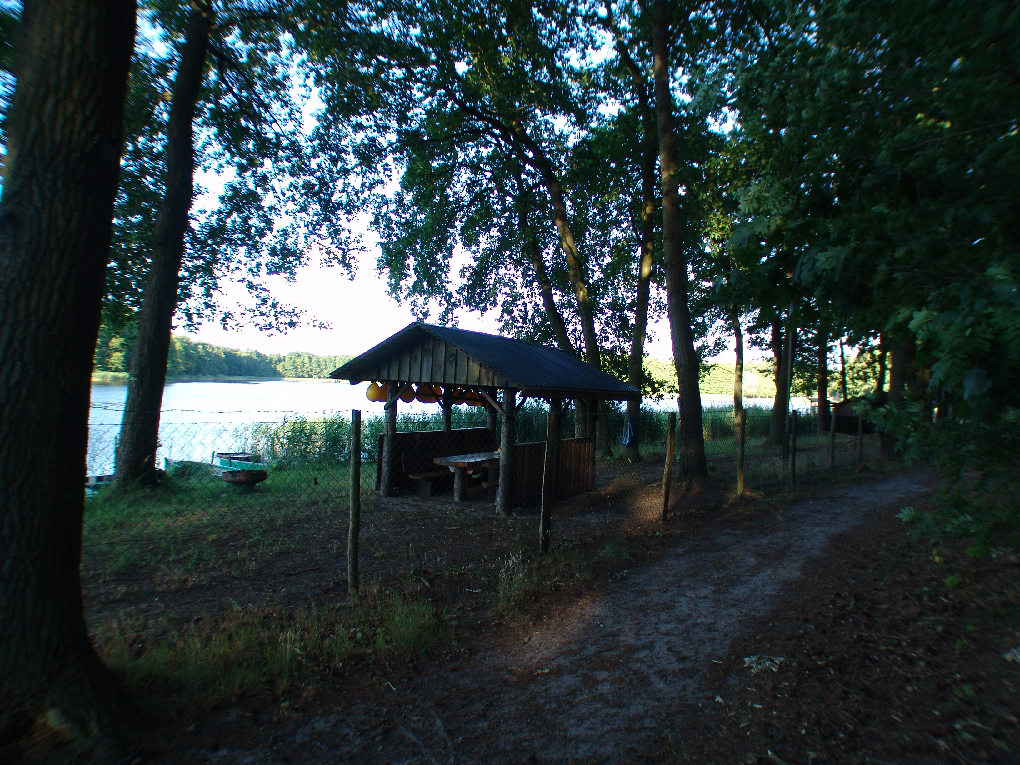 Böhmerheide, Schorfheide: Das Gelände des Anglervereins von der Landseite